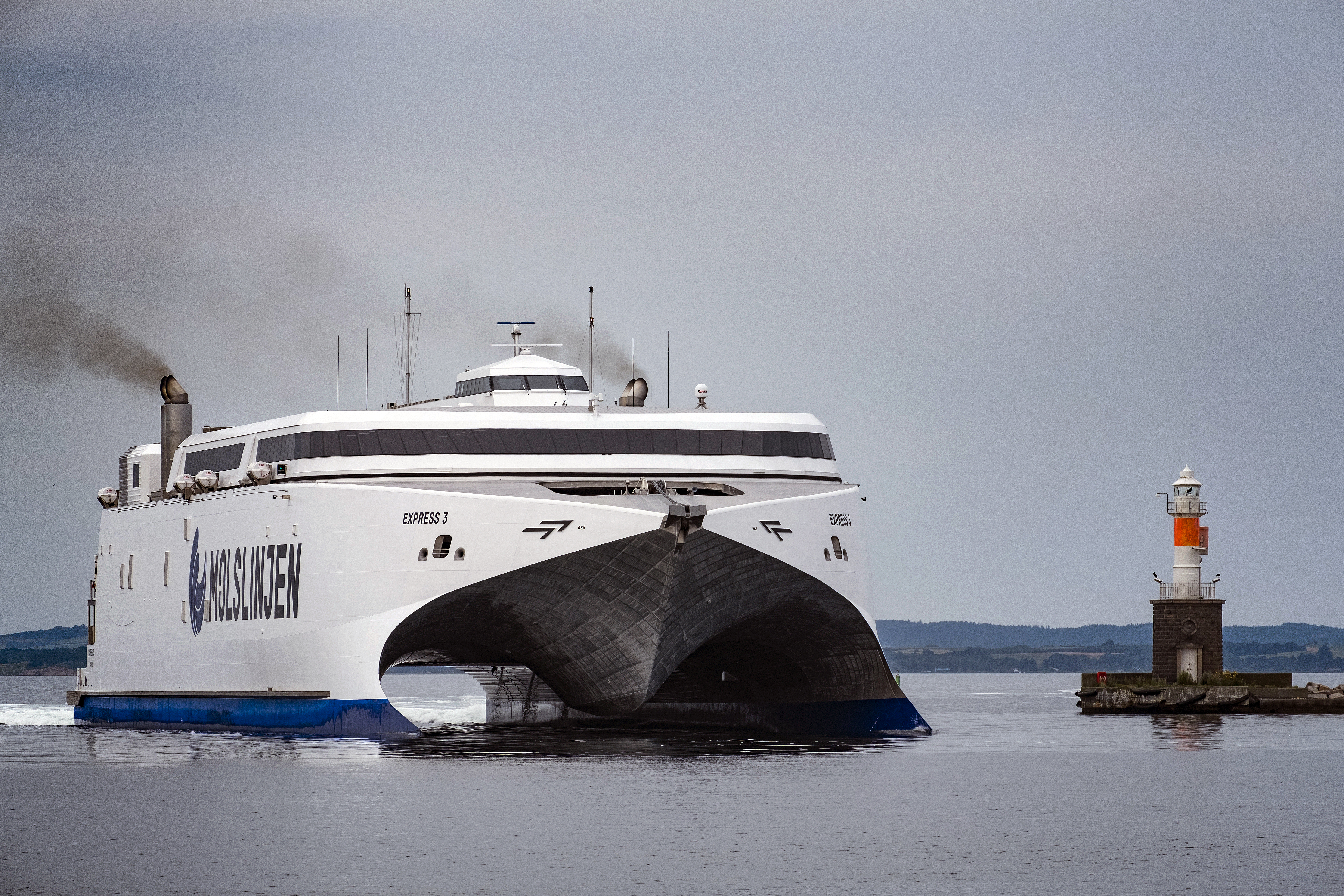 Molslinjens snabbfärja / katamaran Express 3 på väg in i Aarhus hamn. Molslinjen seglar mellan Odden på Själland och Aarhus på Jylland..Photo: News Øresund - Johan Wessman.© News Øresund - Johan Wessman (CC BY 3.0)..Detta verk av News Øresund är licensierat under en Creative Commons Erkännande 3.0 Unported-licens (CC BY 3.0). Bilden får fritt publiceras under förutsättning att källa anges. .The picture can be used freely under the prerequisite that the source is given. News Øresund, Malmö, Sweden.News Øresund är en oberoende regional nyhetsbyrå som är en del av det oberoende dansk-svenska kunskapscentrat Øresundsinstituttet...